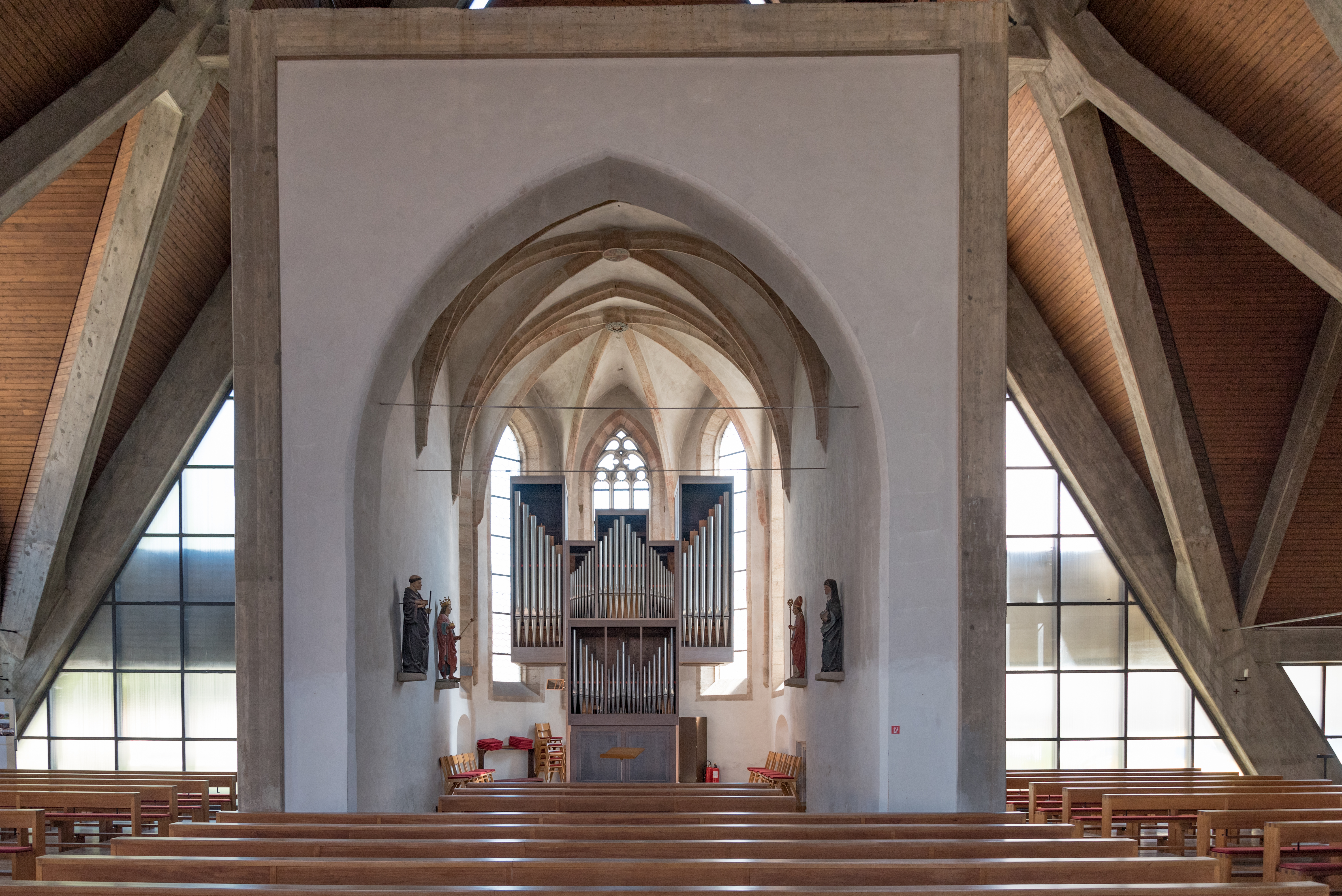 Ornbau, Bischof-Gundekar-Straße 1